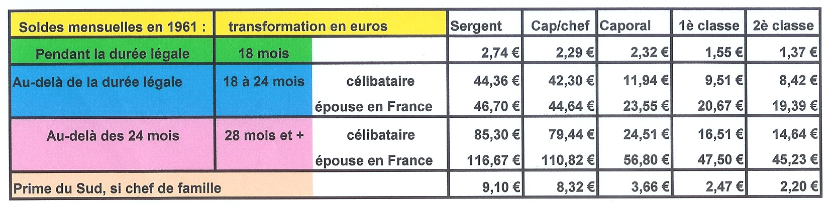 Tableau soldes Appelés en Algérie Transformation des N.F. de 1961 en euros